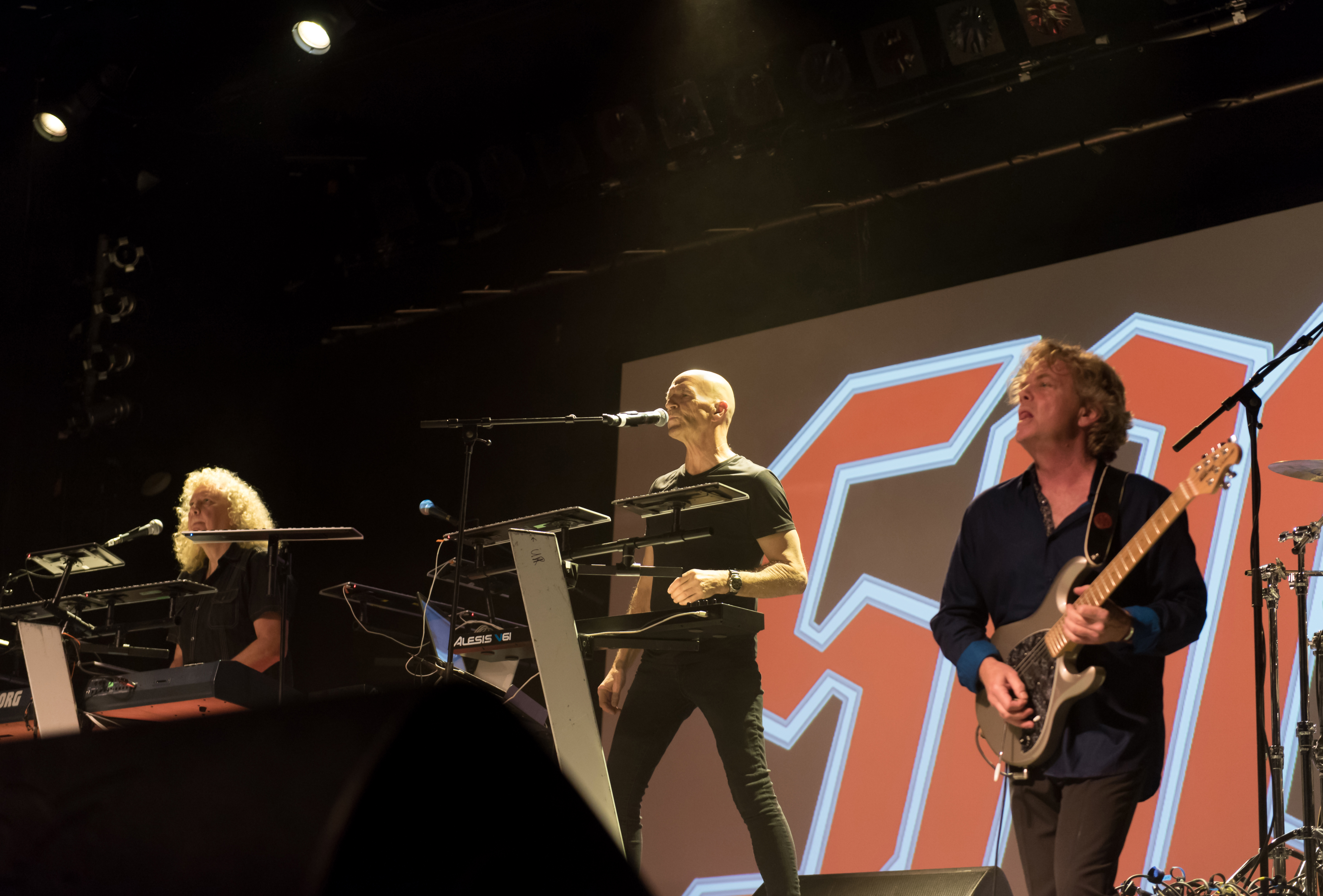 Saga bei der 40th Anniversary - The Final Chapter Tour im Docks Hamburg 2017